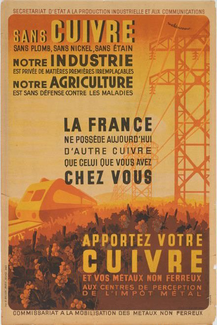 Affiche publicitaire édité durant la Seconde guerre mondiale par le Secrétariat d'Etat à la production industrielle et aux communications, dans le Cadre de la Mobilisation des métaux non-ferreux.